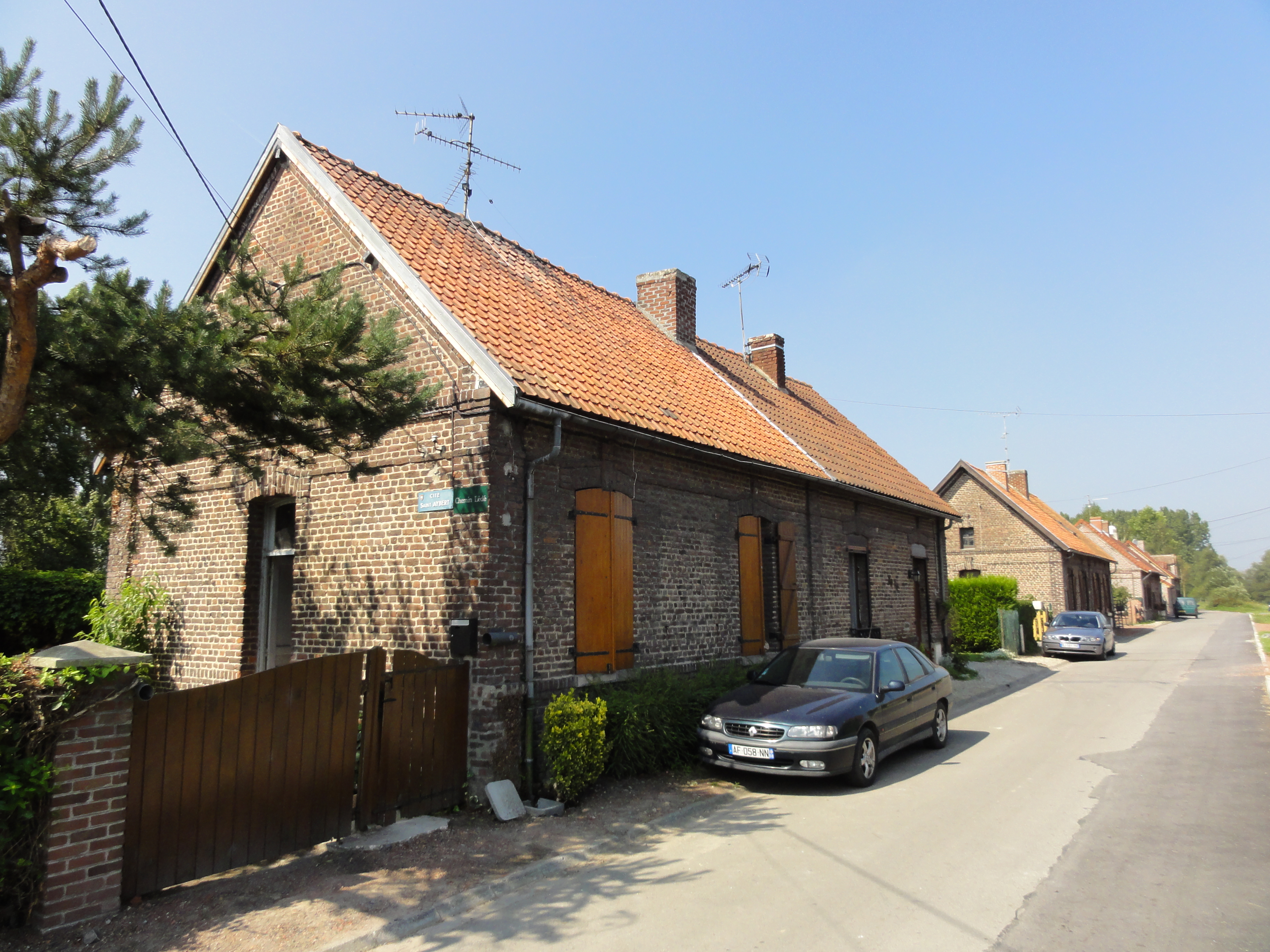 Cité de la fosse Saint-Aybert de la Compagnie des mines de Thivencelle, Thivencelle, Nord, Nord-Pas-de-Calais, France.